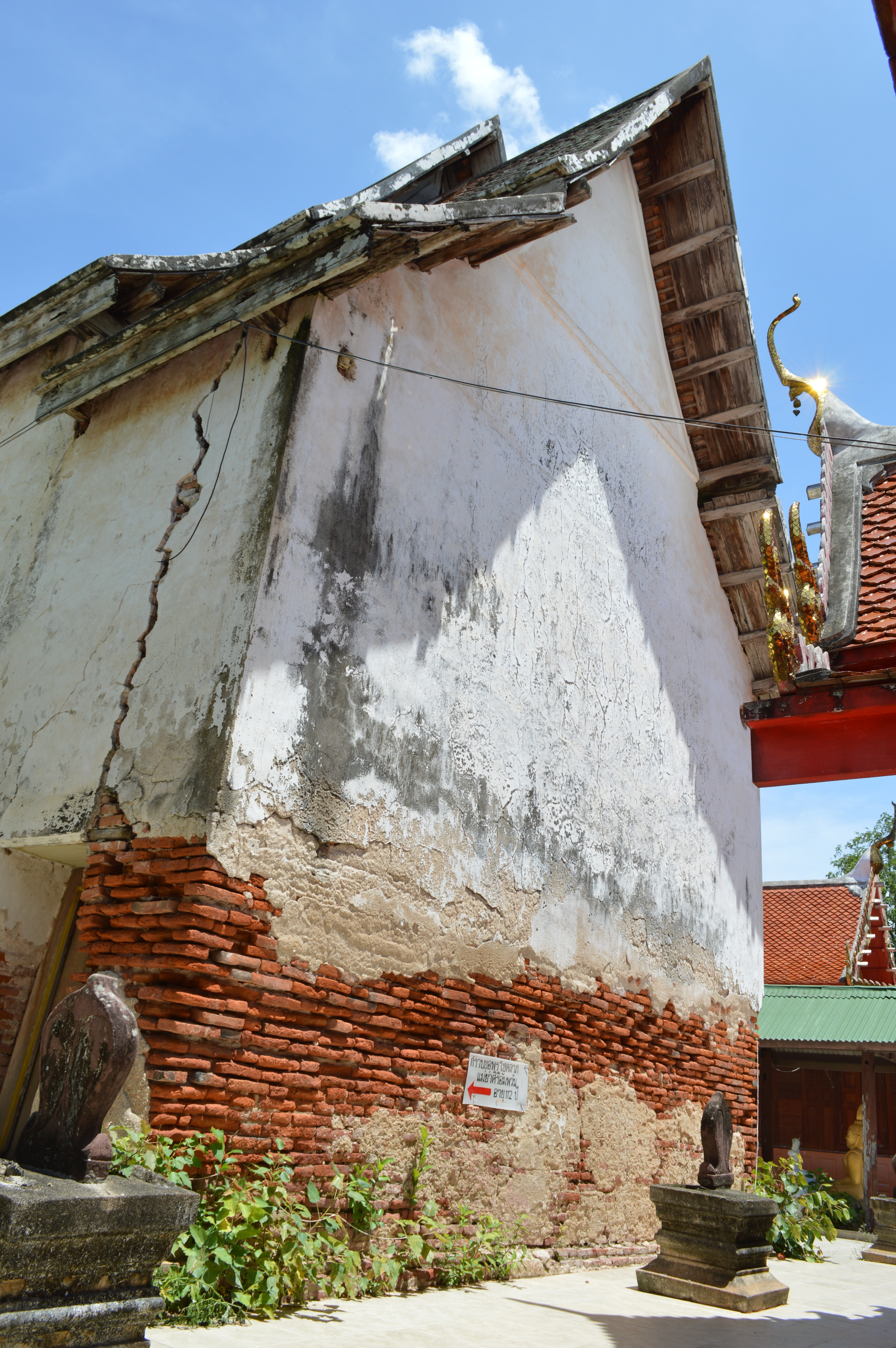 วัดอินทาราม โบสถ์มหาอุตม์ เป็นโบสถ์ที่มีประตูเข้าออกแค่หน้าโบสถ์เพียงประตูเดียว ซึ่งเป็นสถานที่ศักดิ์สิทธิ์ที่บรรพบุรุษในสมัยนั้น มีความศรัทธาสร้างขึ้น วัตถุประสงค์ก็เพื่อใช้กระทำการทางด้านเวทมนต์คาถา ปลุกเสกพระ ตะกรุด หรือ ของขลัง ต่างๆ ส่วนสาเหตุที่โบสถ์มีทางเข้าออกเพียงทางเดียวนั้นก็เพราะไม่ต้องการให้คาถาระหว่างปลุกเสกรั่วออกไปนั้นเอง และด้วยเหตุผลที่เป็นโบสถ์ที่มีประตูเข้าออกเพียงประตูเดียวจึงทำให้หาดูค่อนข้างยากและมีไม่กี่แห่งในประเทศไทย